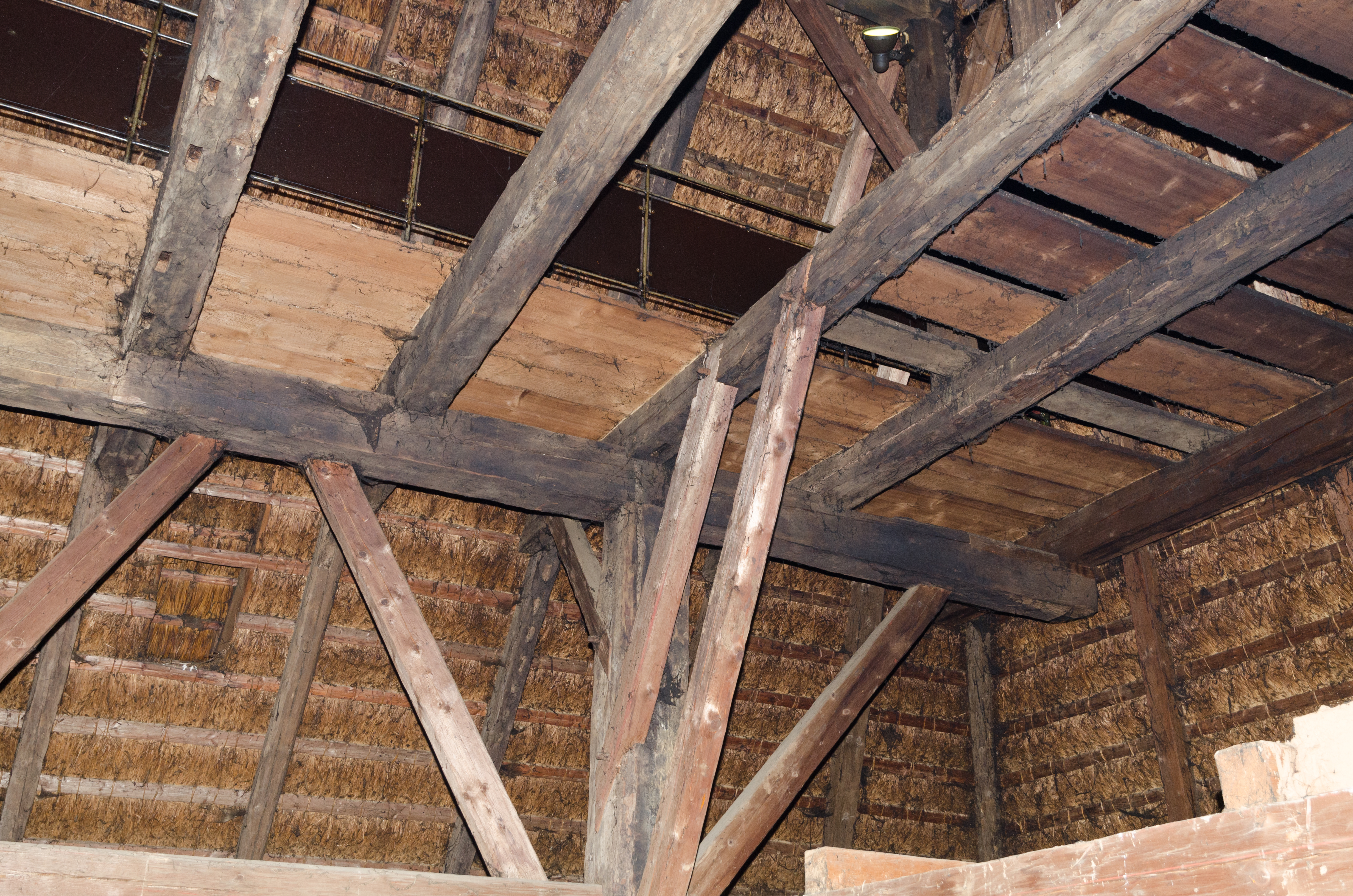 Bad Windsheim, Fränkisches Freilandmuseum, Nr. 095